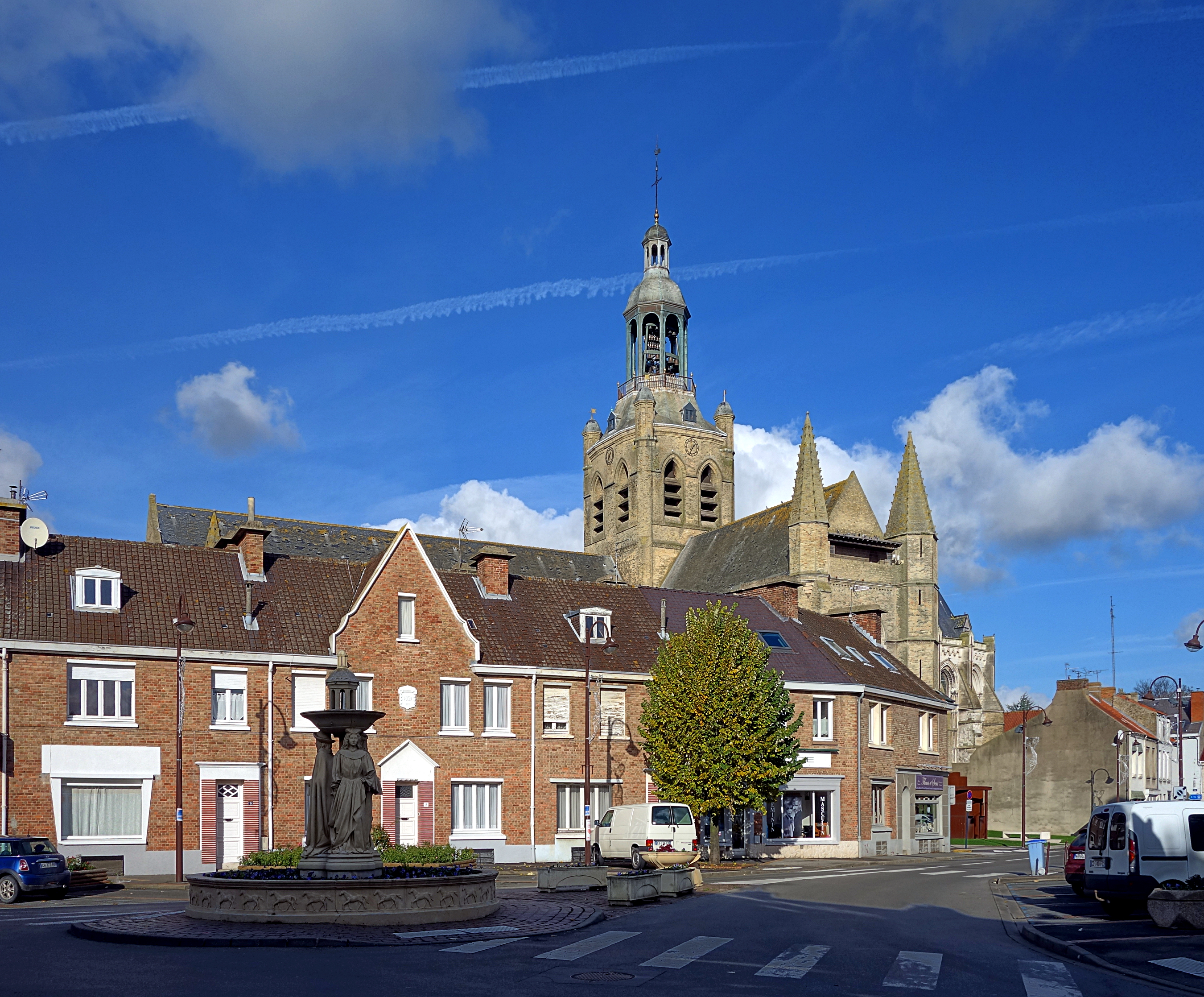 L'église Saint-Jean-Baptiste à Bourbourg (Nord).